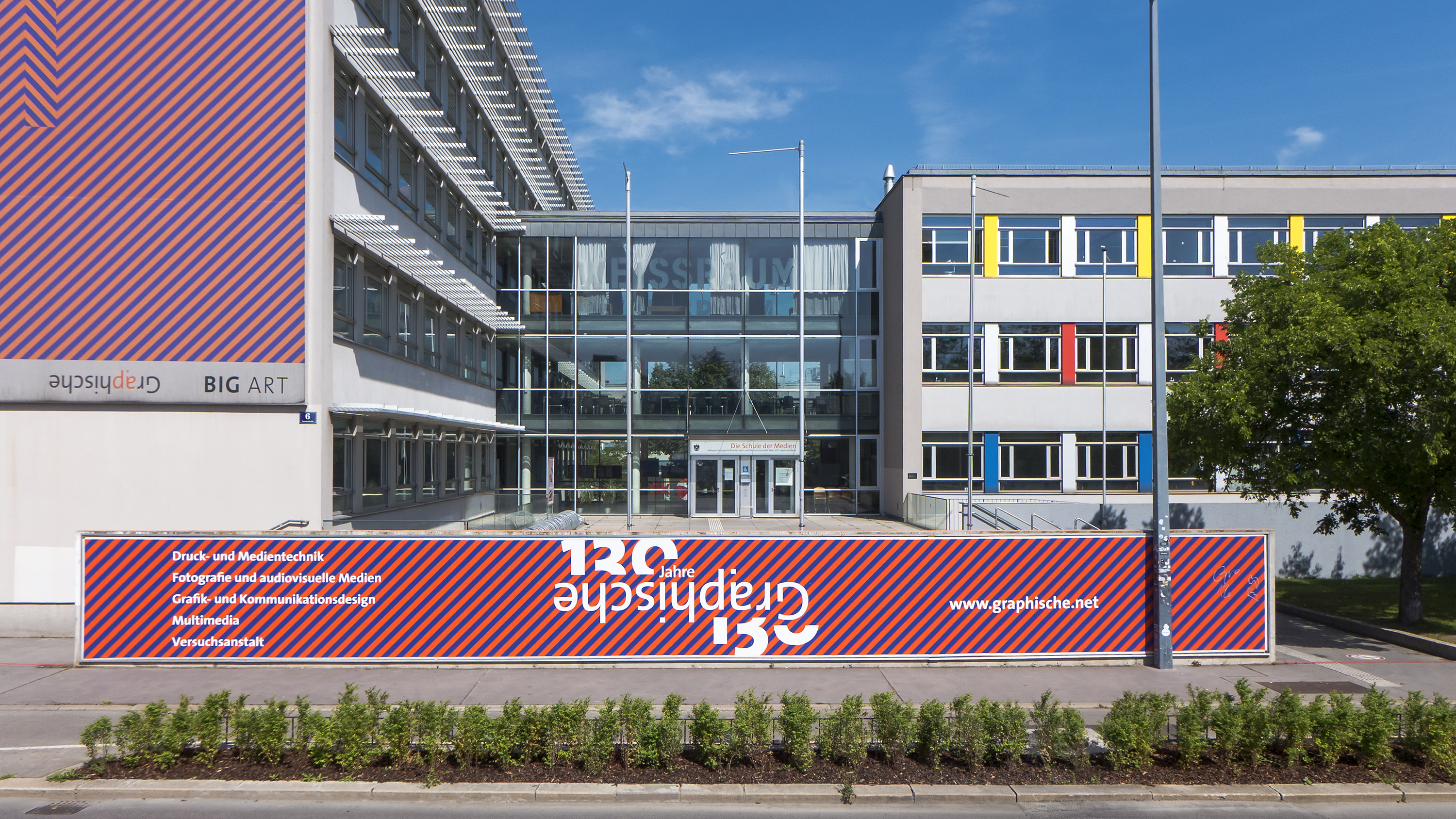 Höhere Graphische Bundes-Lehr- und Versuchsanstalt in Wien 14